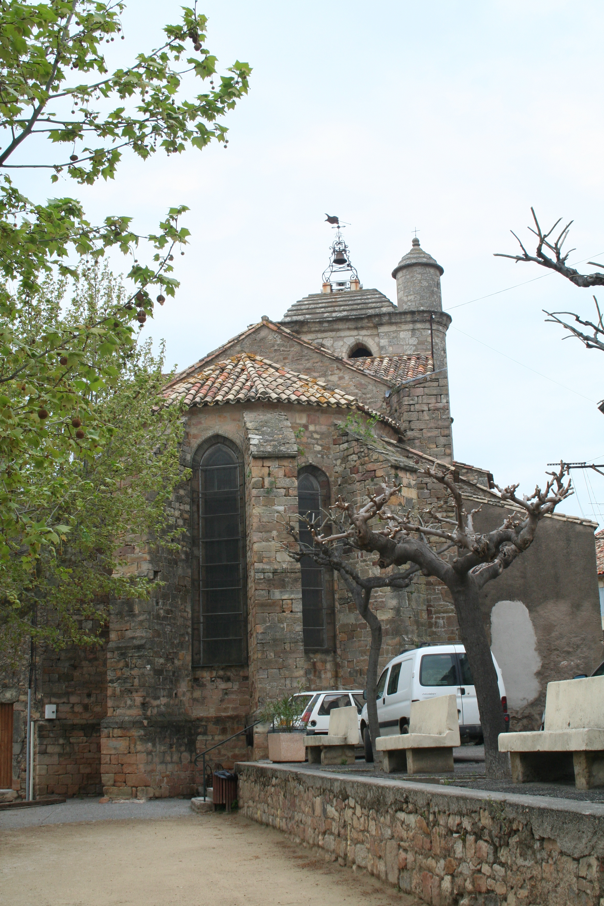 Neffiès (Hérault) - abside de l'église Saint-Alban.